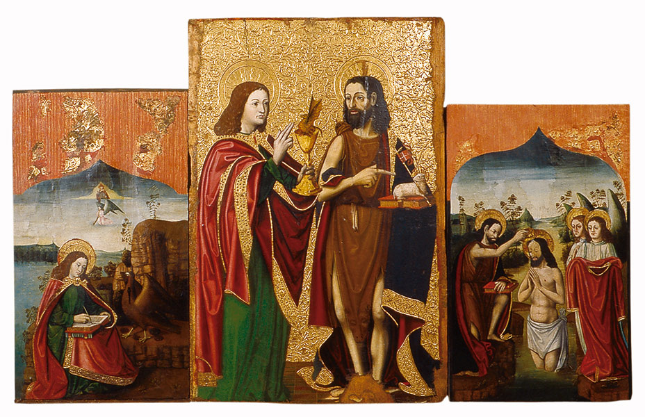 Tablas del retablo de Sant Joan de Fàbregues procedente de la iglesia parroquial de Rupit (Osona) Catalunya. conservado en el Museo Episcopal de Vic